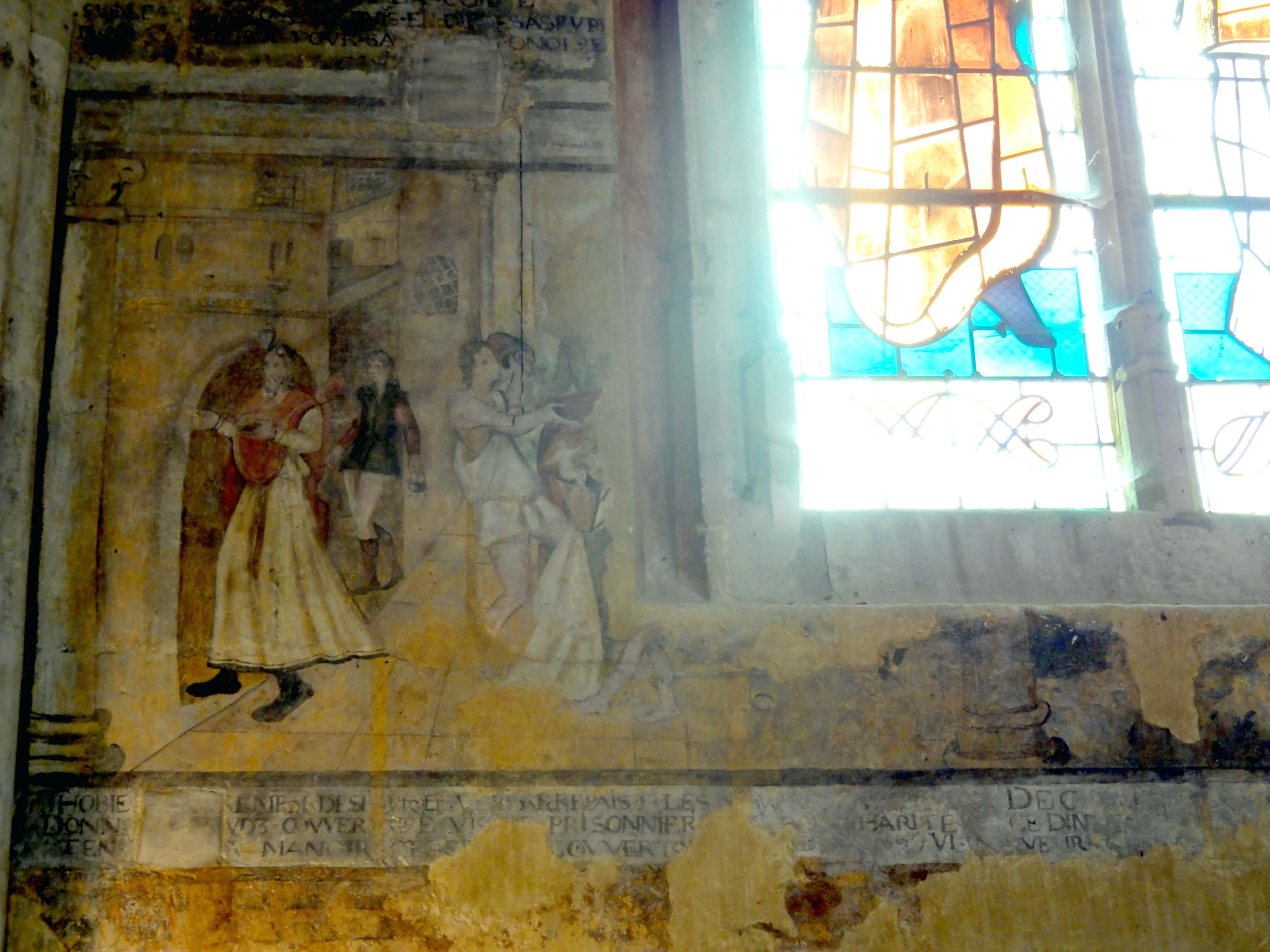 Chapelle de la Charité, peintures murales côté nord.